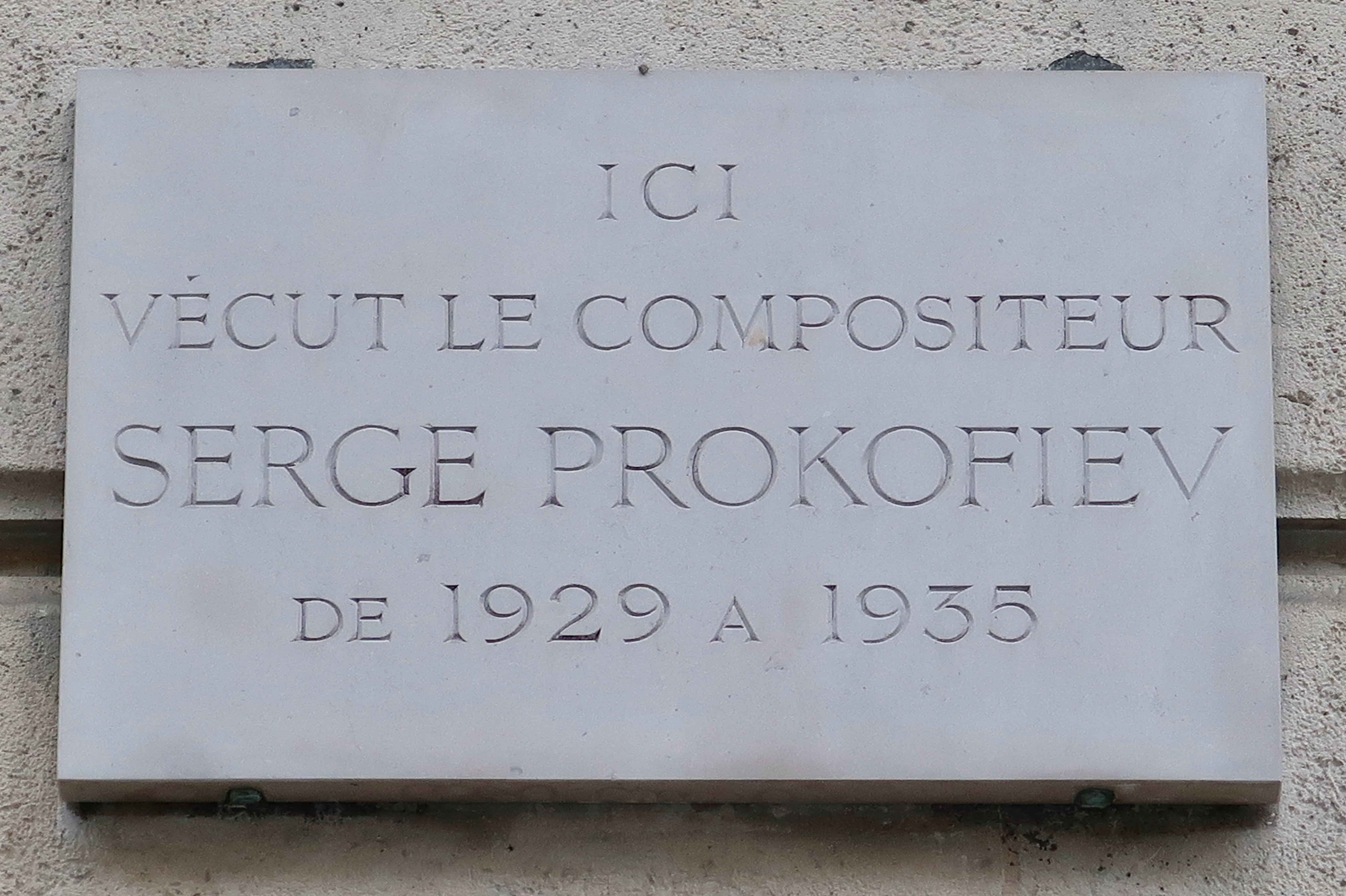 Plaque en hommage à Serge Prokofiev, 5 rue Valentin-Haüy (Paris, 15e).